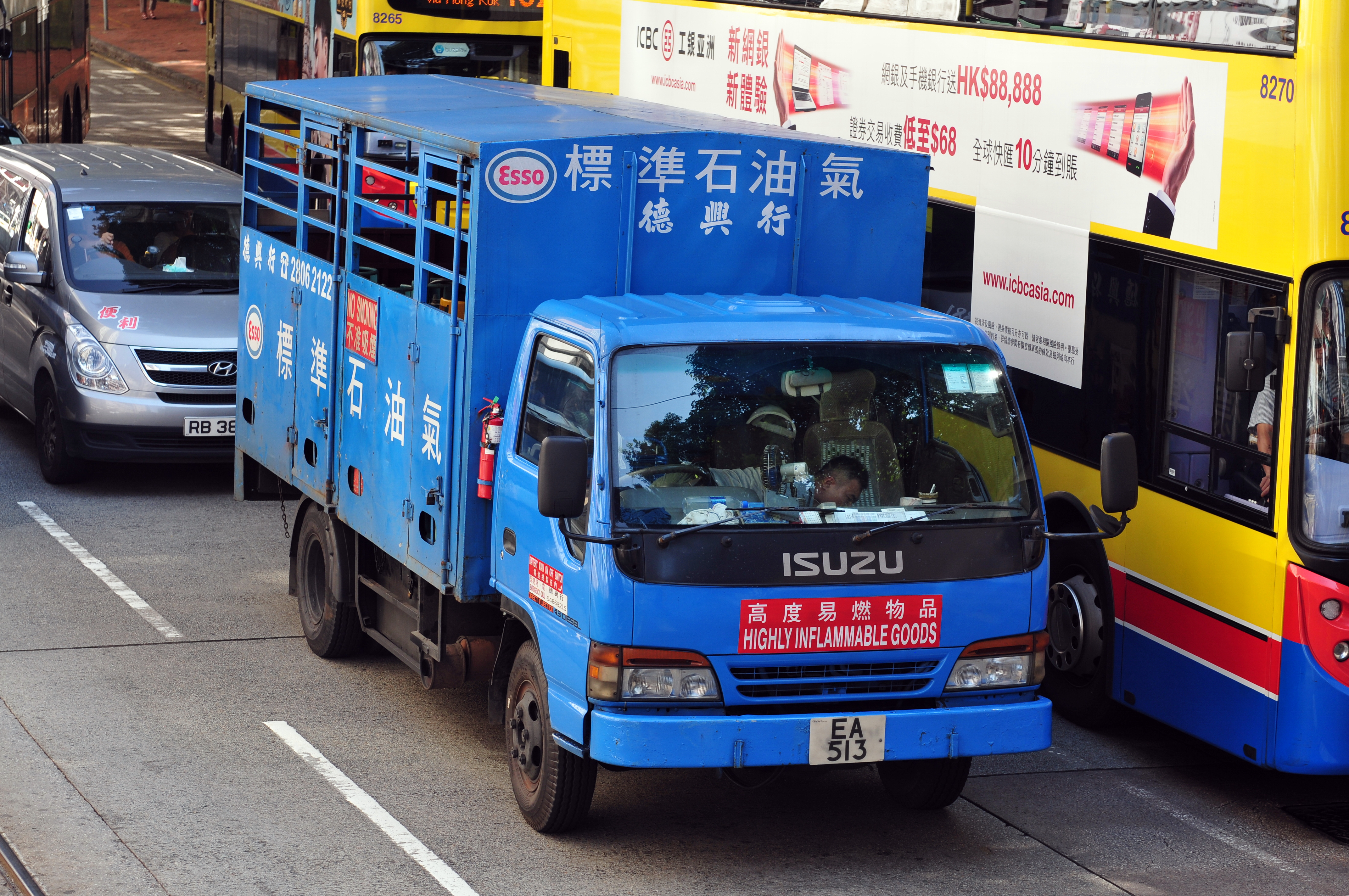 Wikimania 2013 Hongkong